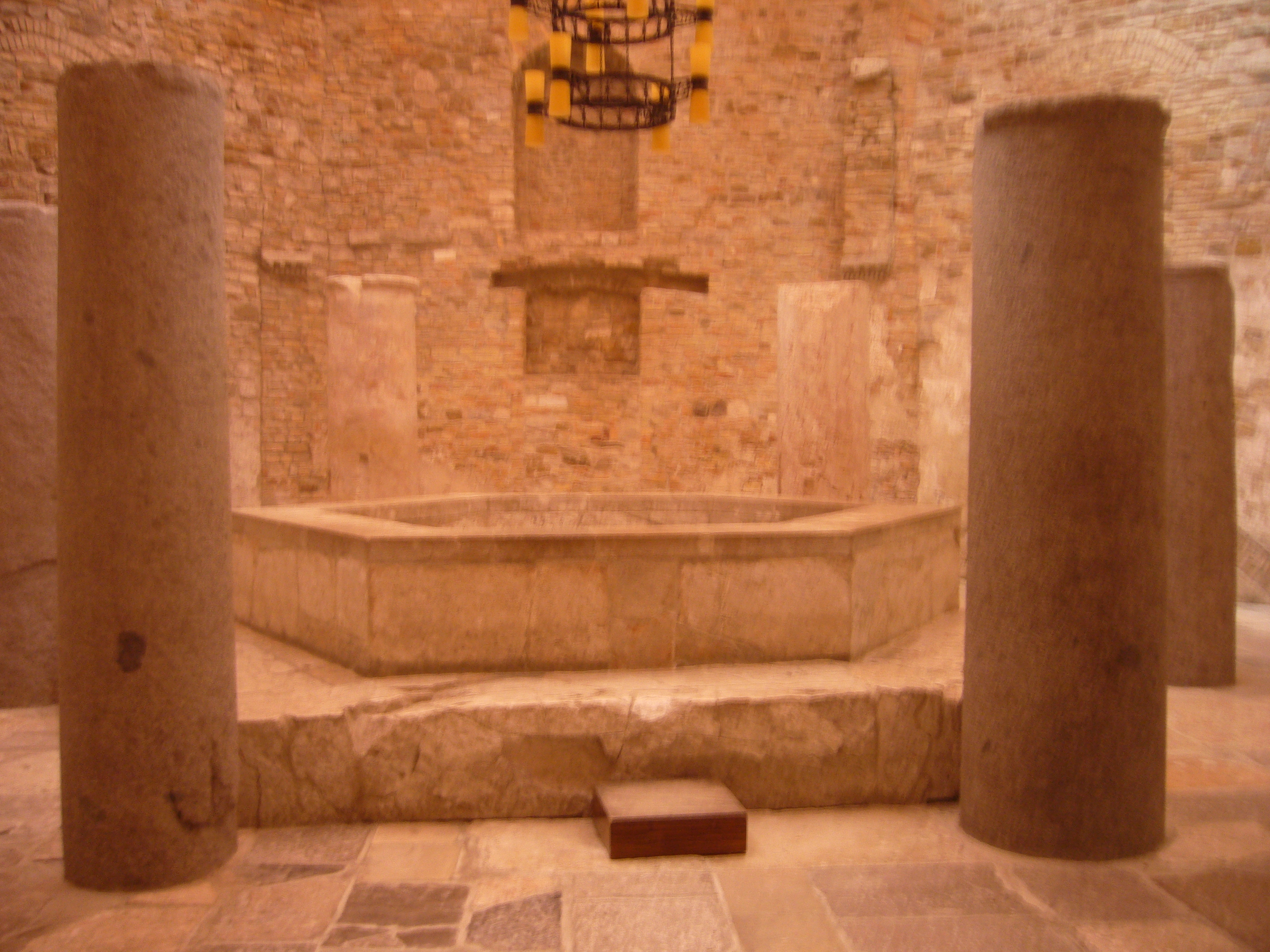 Basiliek van Aquilea, doopkapel